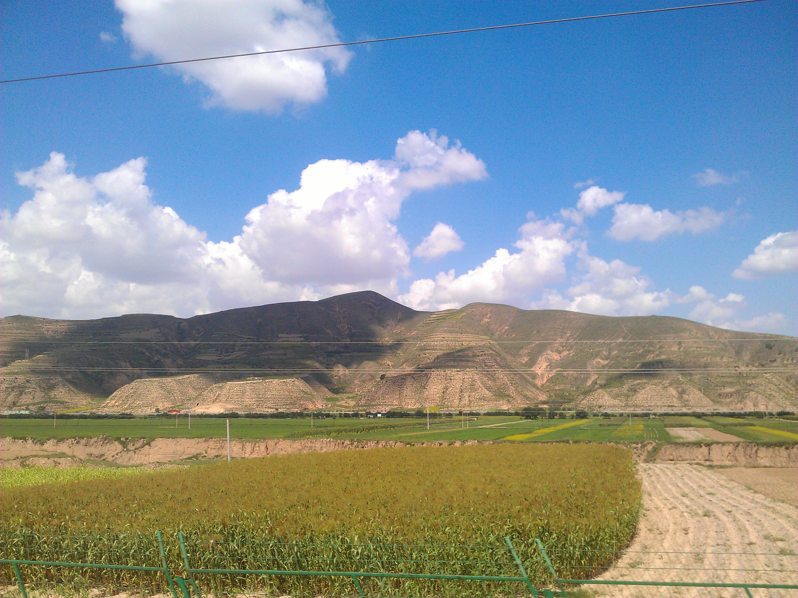 火车窗外